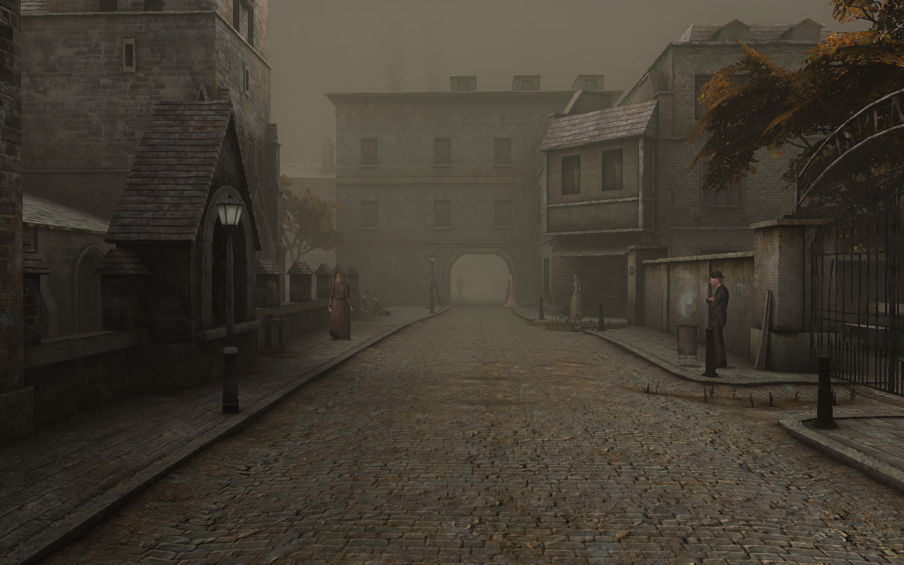 Capture d'écran du jeu Sherlock Holmes contre Jack l'Éventreur. Nous sommes ici dans une rue de Whitechapel, dans la journée. La réalisation du quartier de Whitechapel dans ce jeu est réputée pour son réalisme.